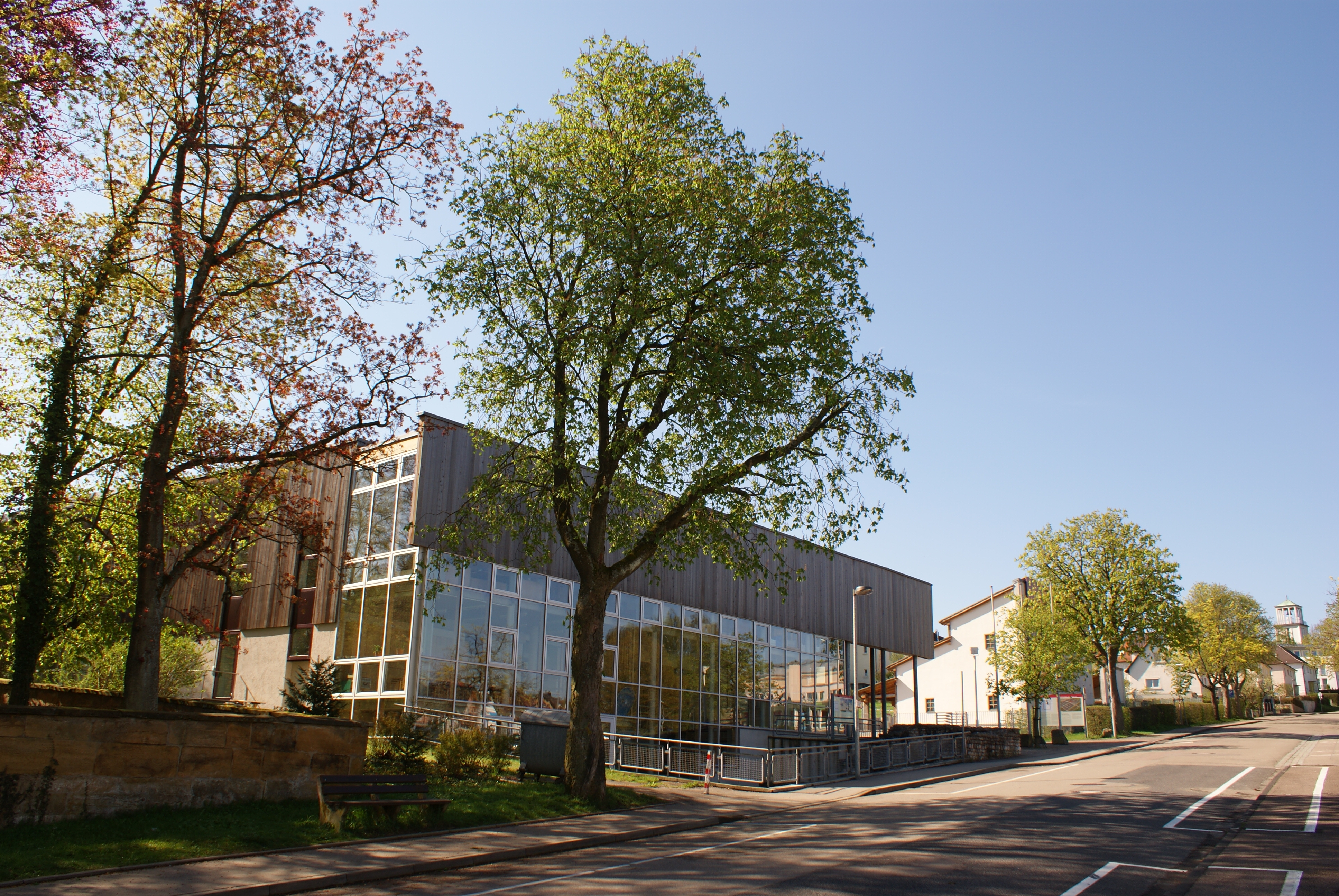 Limesmuseum Aalen, Außenansicht des Museumsgebäudes von Norden.